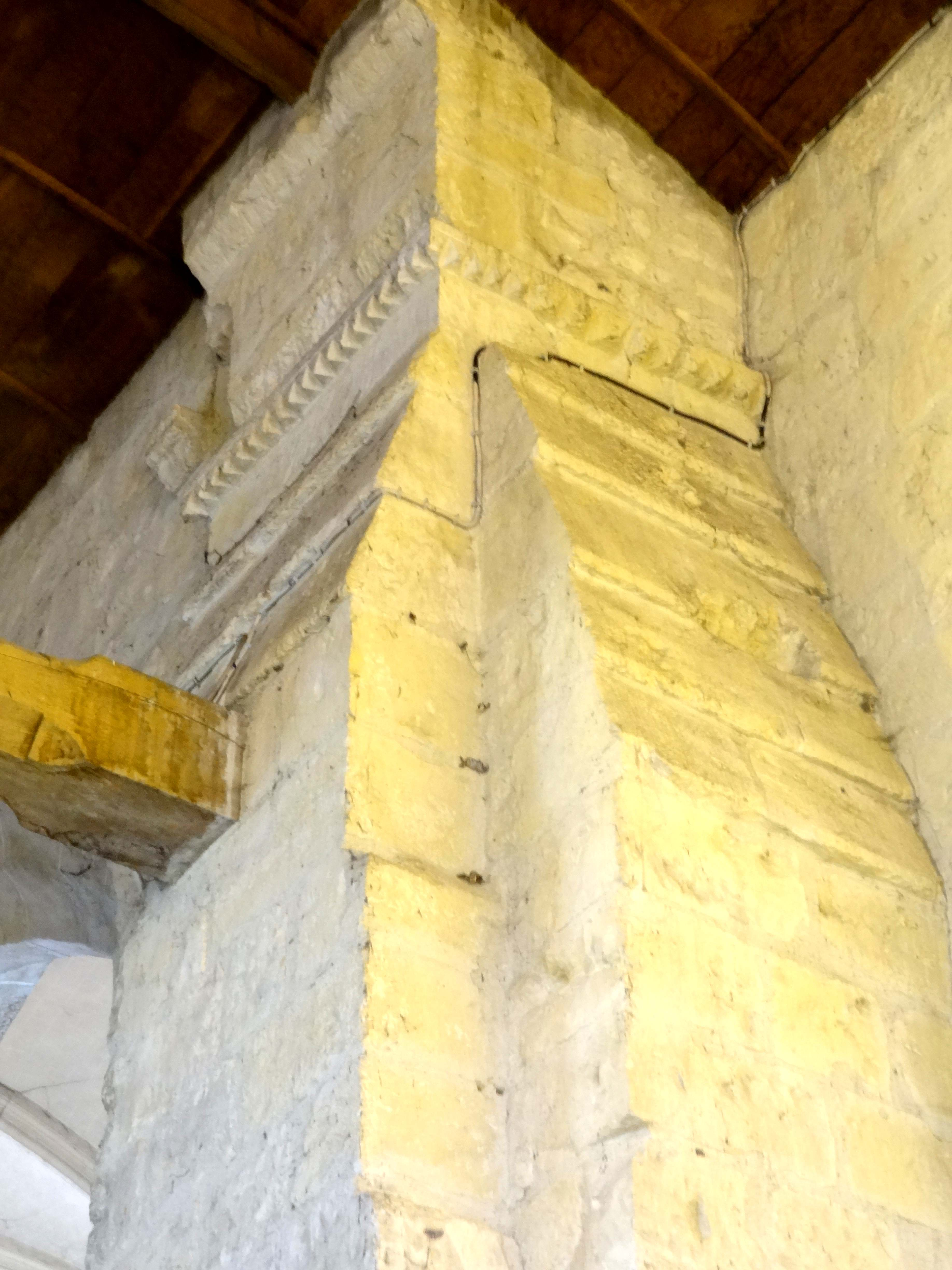 Intérieur de l'église - voir titre.